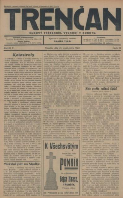 Titulný list týždenníka Trenčan.